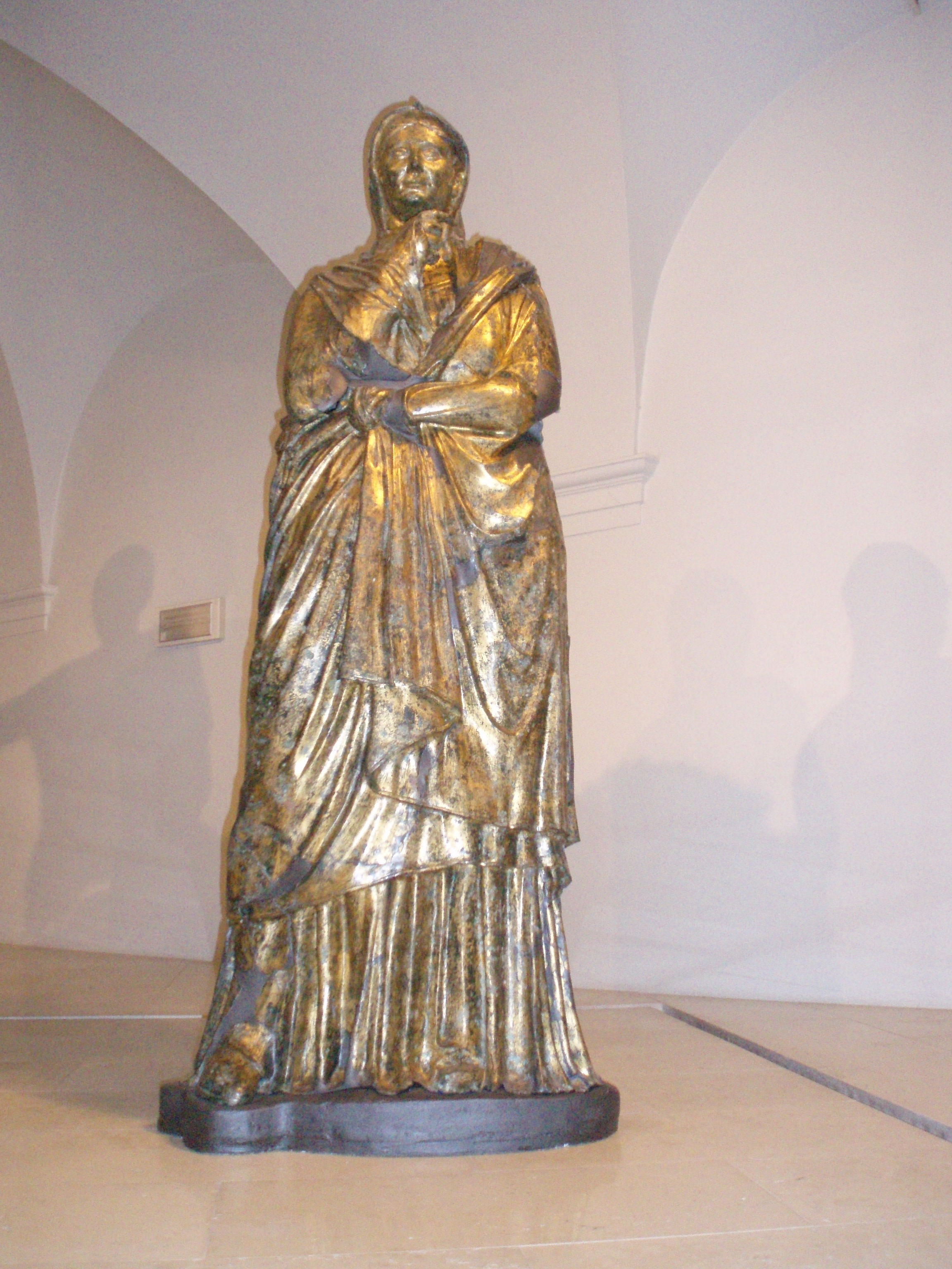 Bronzi dorati da Cartoceto di Pergola - 03